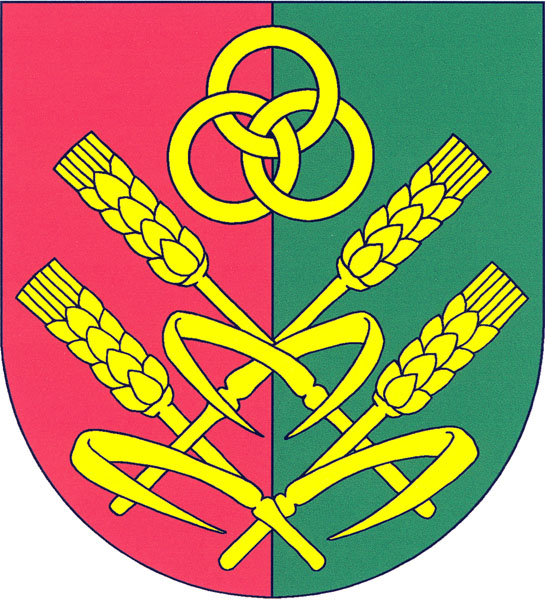 Znak obce Jenišovice (okres Chrudim)